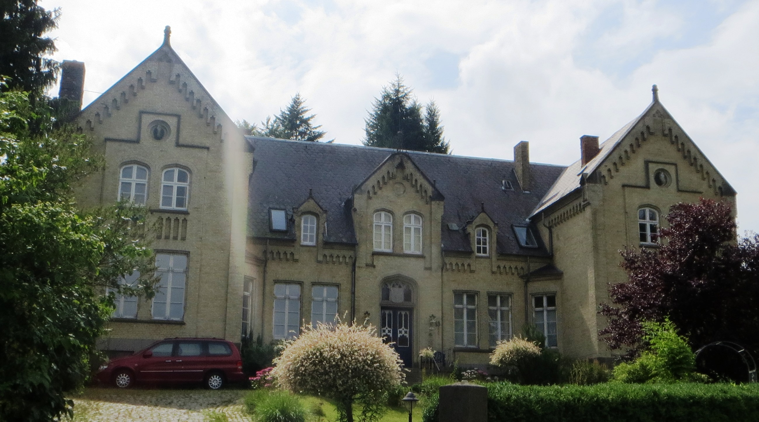 Amtshaus in Ratzeburg-St. Georgsberg, errichtet 1862, später Landratsamt